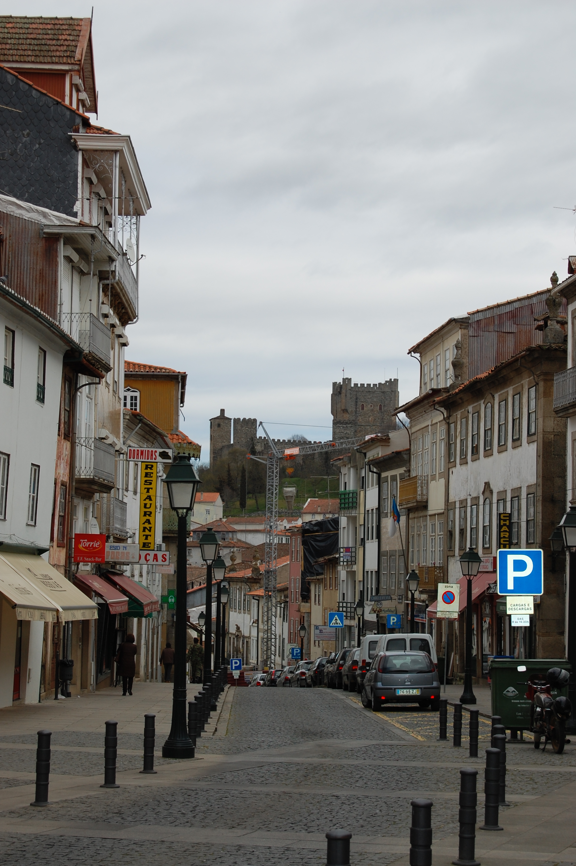 A cidade de Bragança, no nordeste de Portugal.